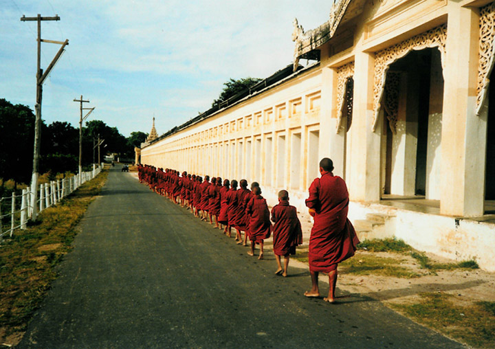 Shwezingon Monastry, Bagan - Burma/Myanmar, 1999